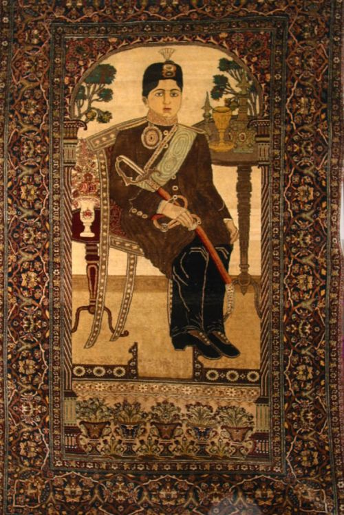 Музей: Брэсцкі абласны краязнаўчы музей Тып: рэчавыя помнікі Від: дэкаратыўна-прыкладное мастацтва Прадметнае імя: дыван персідскі Матэрыялы: воўна; нітка баваўняная; Тэхналогіі стварэння: ткацтва ручное; Дата стварэння: XIX ст. Месца стварэння: Персія Памеры: 204х125 см